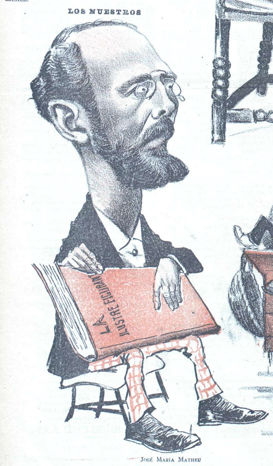 Caricatura.